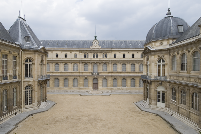 Vue générale de la partie des Grands Dépôts construite sous Napoléon III, pour permettre de faire face à l'accroissement de la masse archivistique à traiter par les Archives nationales.